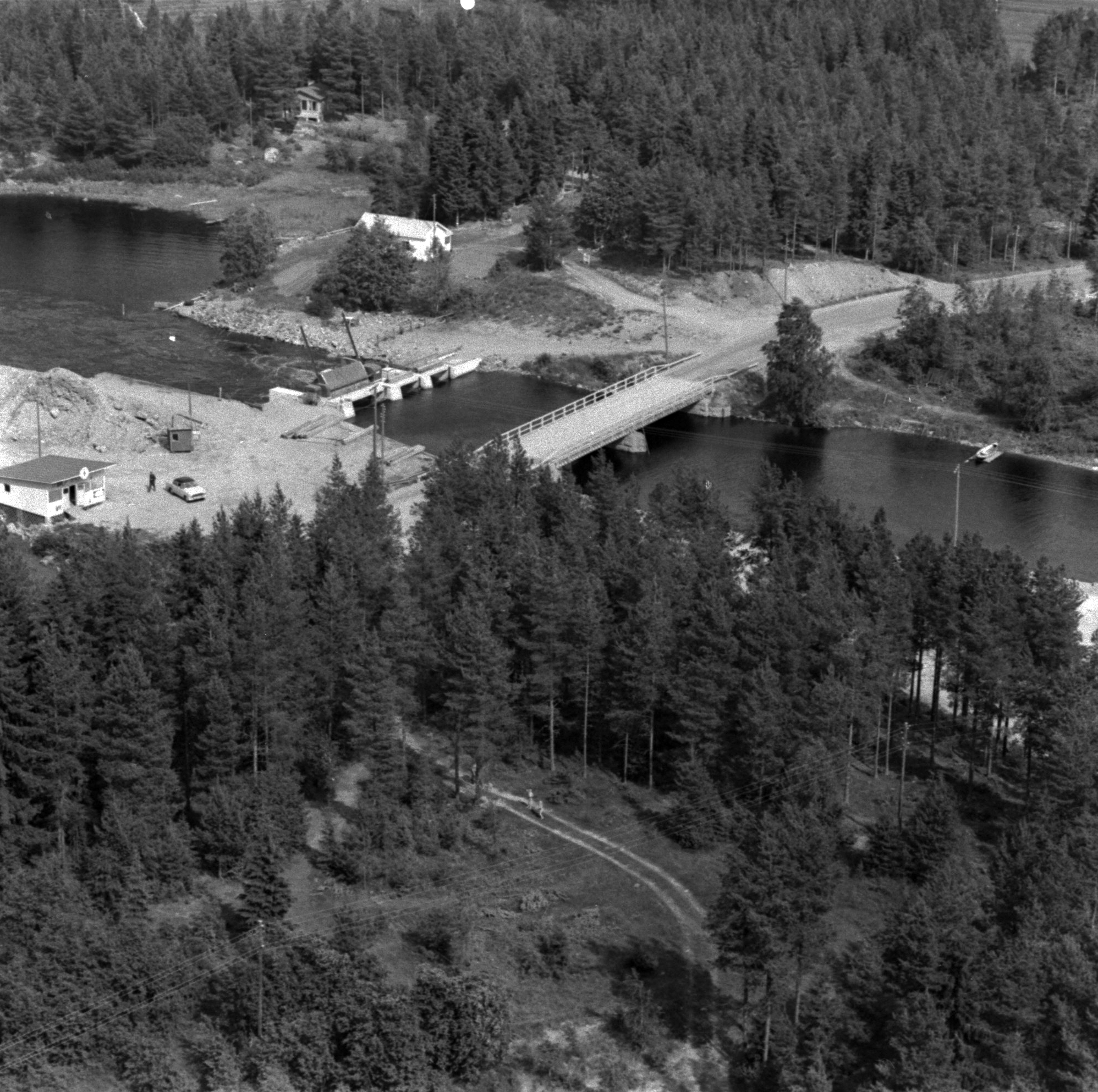 Niskan silta ja pato Lappajärvellä Ähtävänjoella, vuonna 1962.